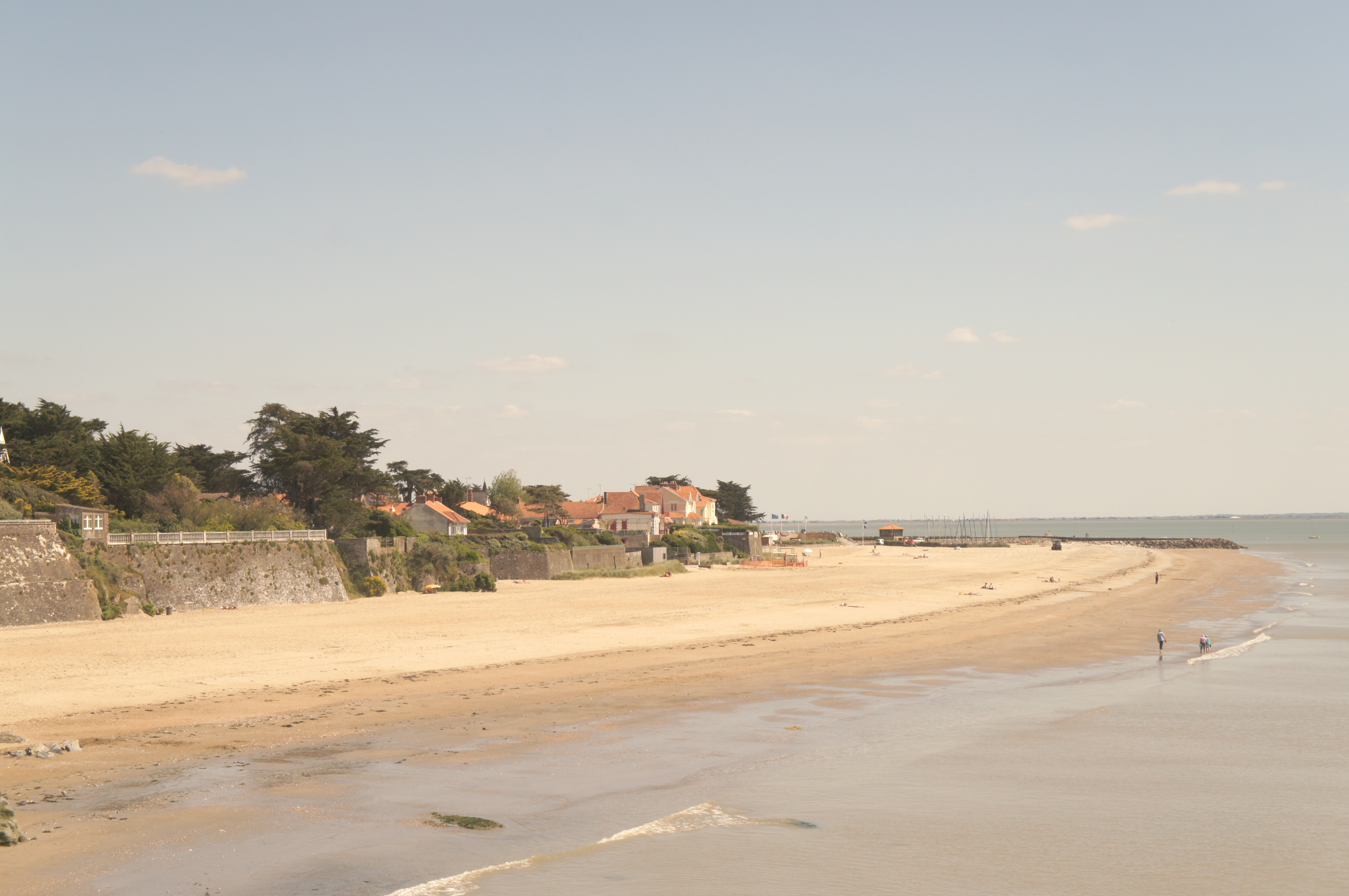 la Grande Plage de la Bernerie en Retz